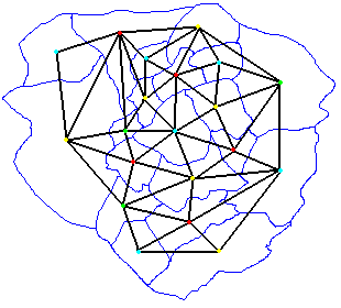 Creada por Romero Schmidtke, para la Enciclopedia Libre